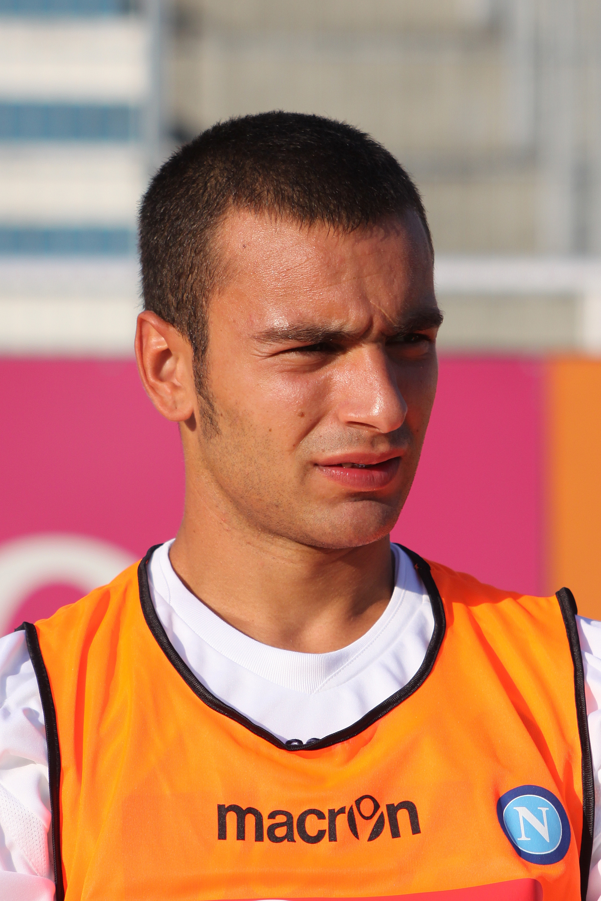 Luigi Vitale - SSC Neapel (1) Luigi Vitale - Società Sportiva Calcio Napoli